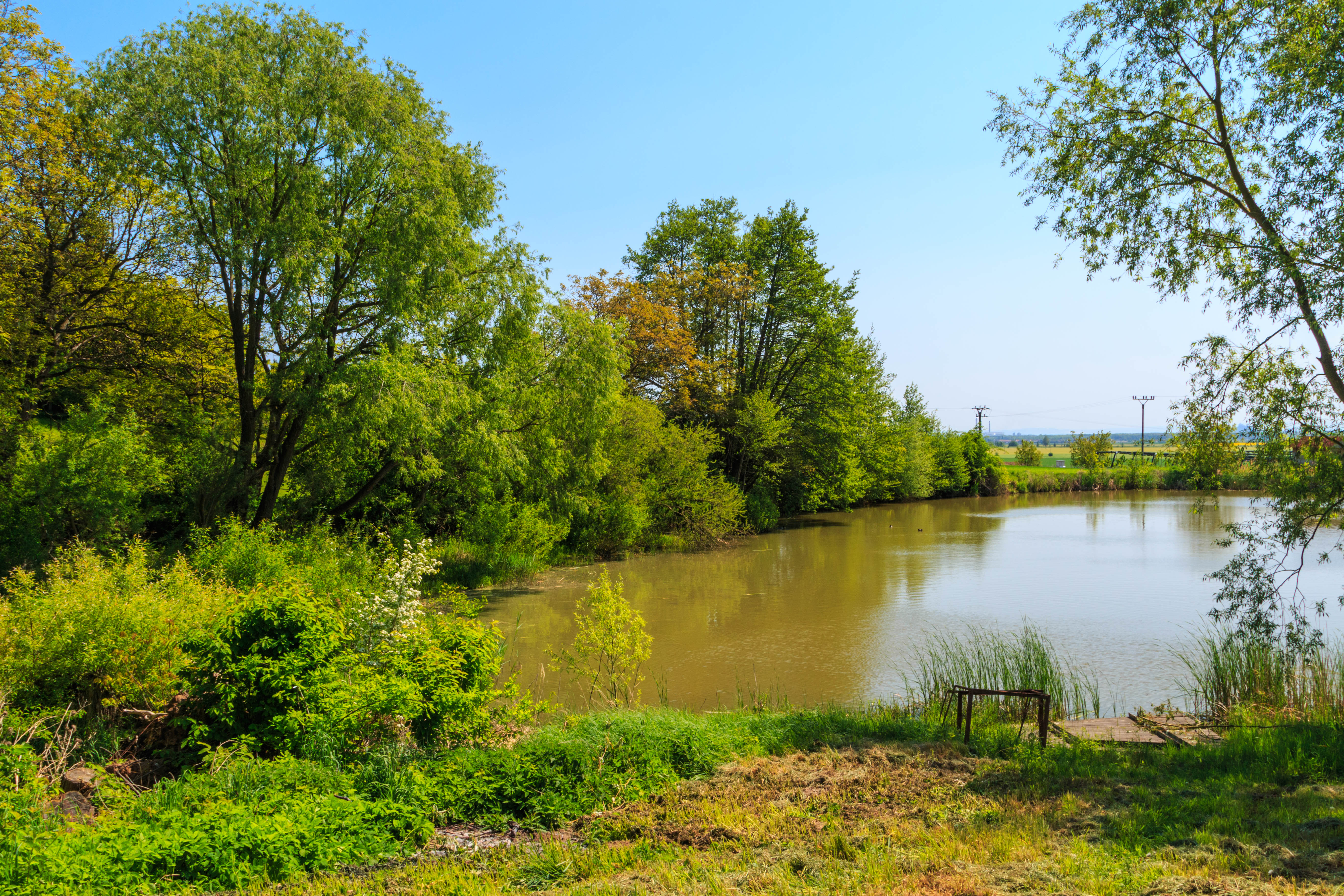 Rybníky Pod Hvozdnicí Project: Vodstvo.